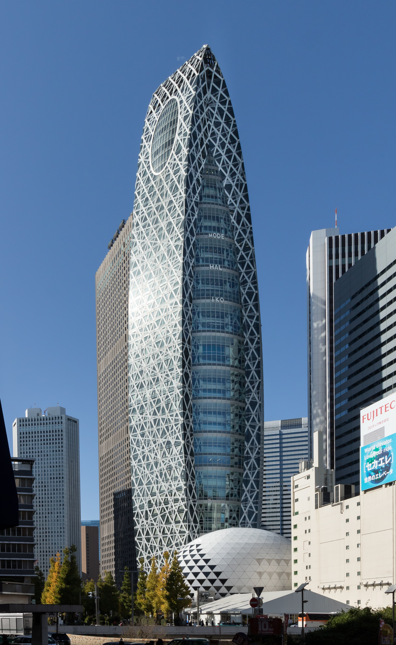 モード学園コクーンタワー、東京都新宿区。